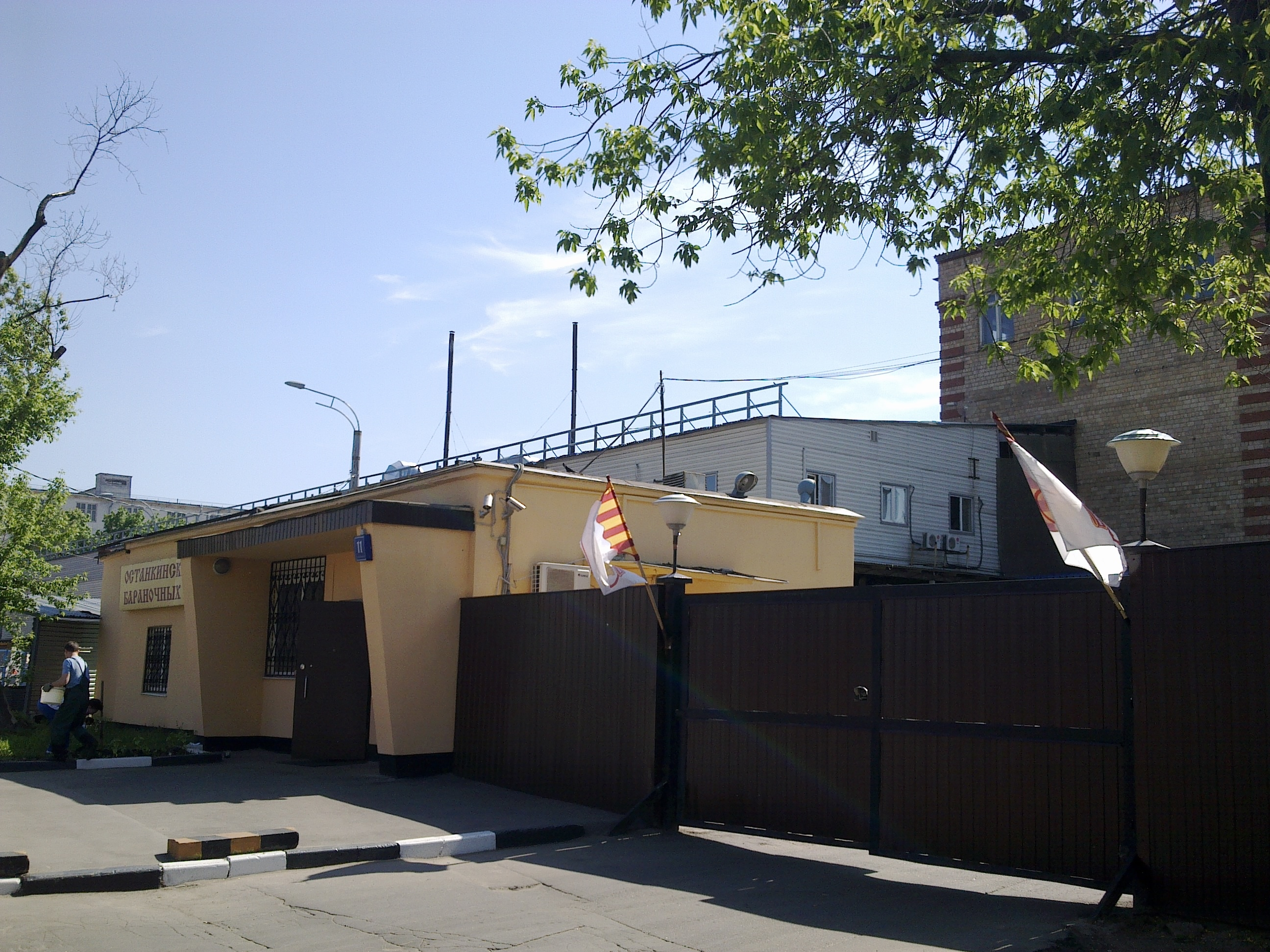 Останкинский завод бараночных изделий. Въезд и проходная. Кирпичное здание за воротами — производственный корпус завода